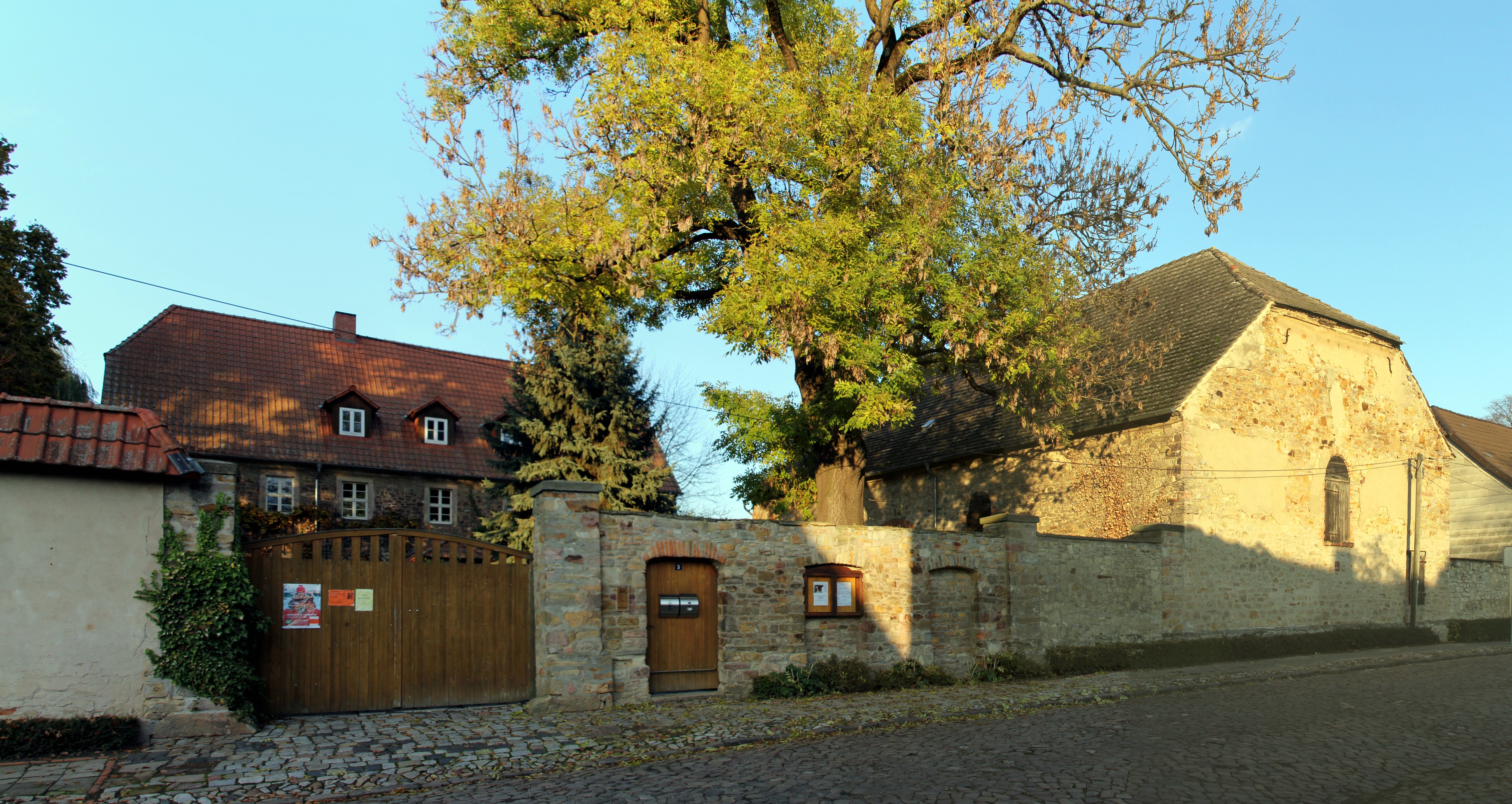 Pfarrhof Lange Straße 3 Groß Rodensleben